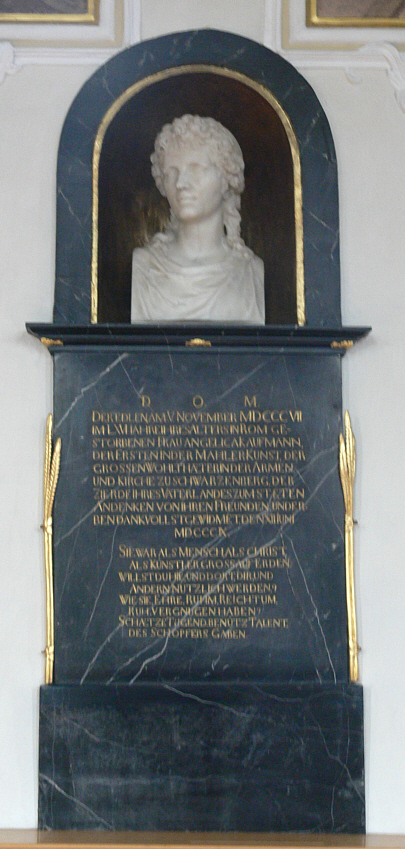 Schwarzenberg, Vorarlberg: Pfarrkirche Heiligste Dreifaltigkeit Gedenkstein für Angelica Kauffmann